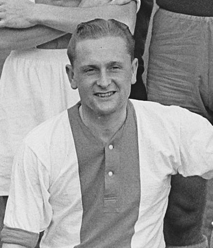 Gé van Dijk.